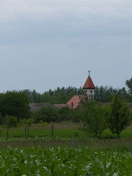 A Szentlélek templom Pusztahencsén